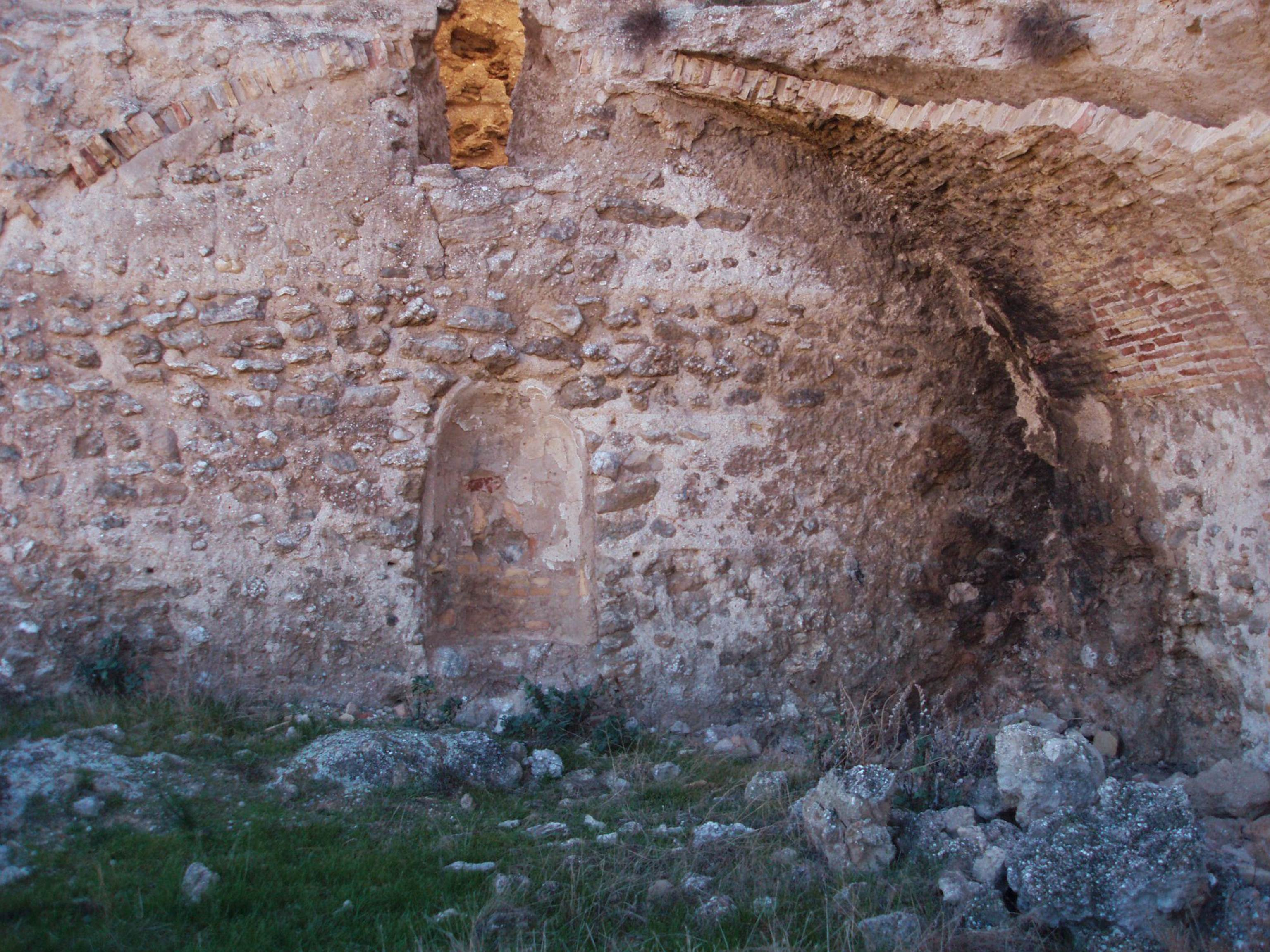 Estado actual de la antigua nave de la ermita de la Virgen de Miranda, que ha sido expoliada y deteriorada.